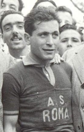 Coppa Italia 1952: Bruno Monti